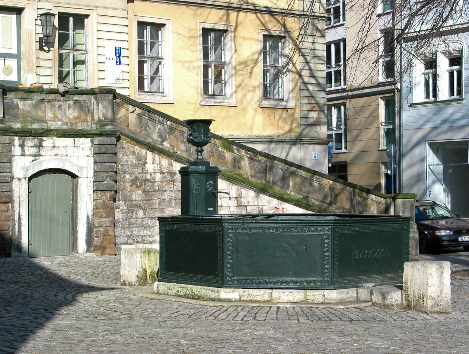 Der Herderbrunnen aus dem Jahr 1832 von Clemens Wenzeslaus Coudray auf dem Herderplatz in Weimar. Dahinter die Freitreppe des 1712 gegründeten Wilhelm-Ernst-Gymnasiums Weimar.